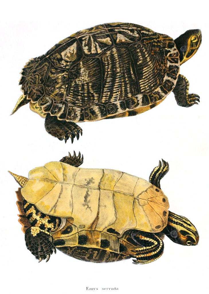 Peninsula Cooter, or Florida River Cooter Emys serrata = Pseudemys peninsularis or Pseudemys floridana